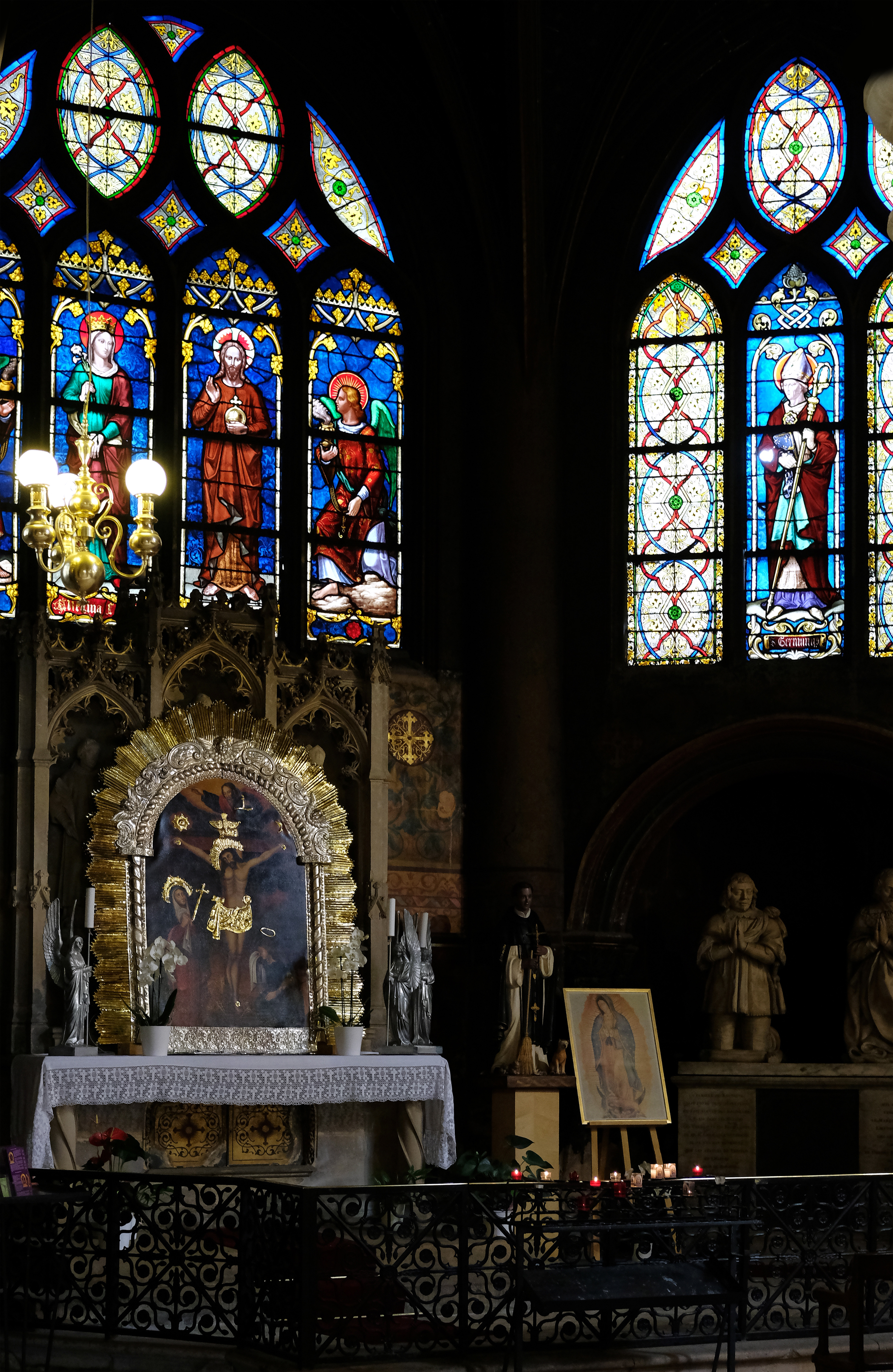 Église Saint-Germain-l'Auxerrois (chapelle Saint-Vincent, Saint-Germain, dite "des saints-patrons, décorée) - Paris Ier